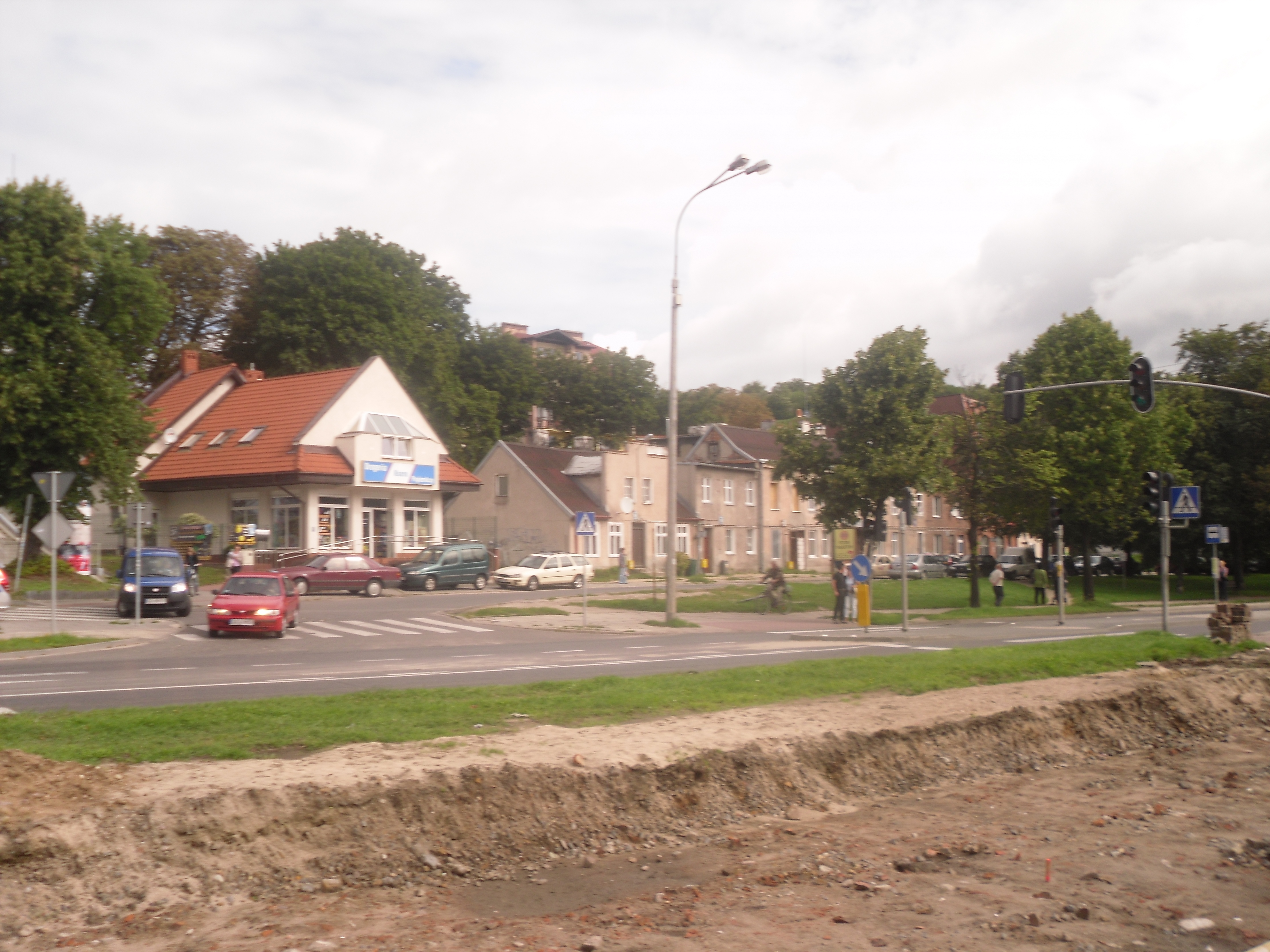 Skrzyżowanie ul. Kartuskiej z ul. Kartuską w Gdańsku Siedlcach.